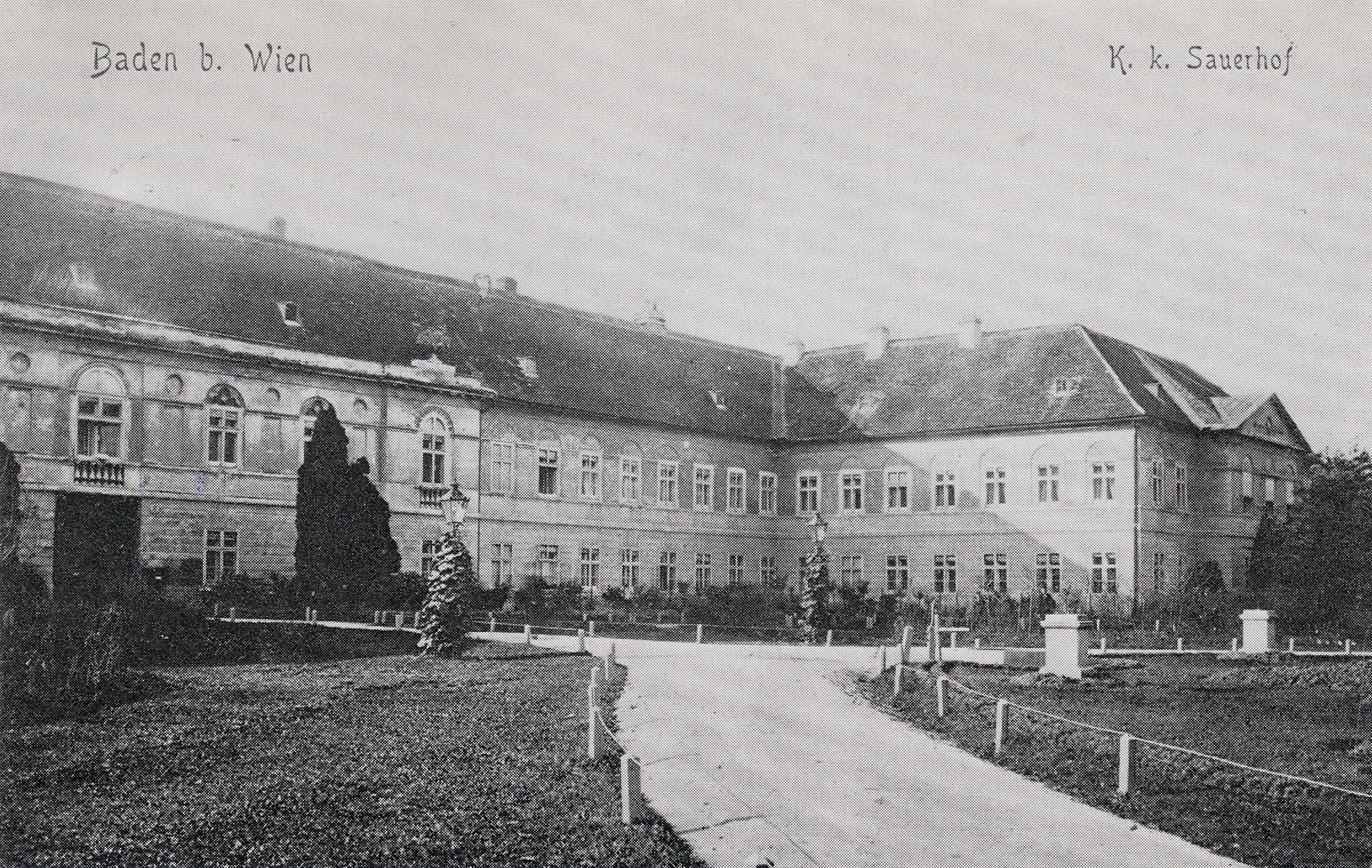 Sauerhof in Baden bei Wien (vor 1919)